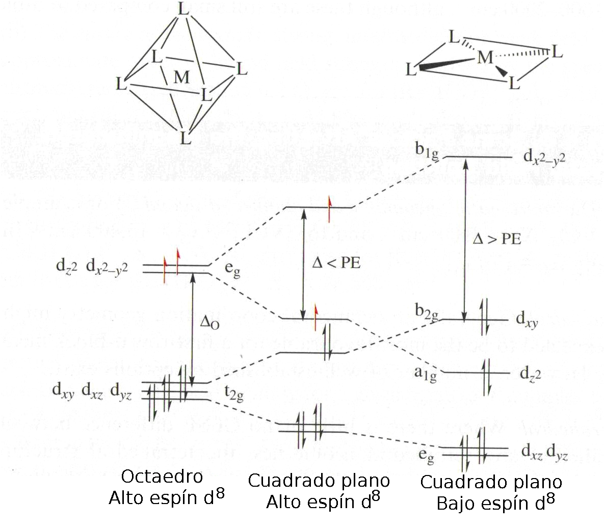 comparação entre diagrama de níveis de energia de um complexo octaédrico e complexo D4h